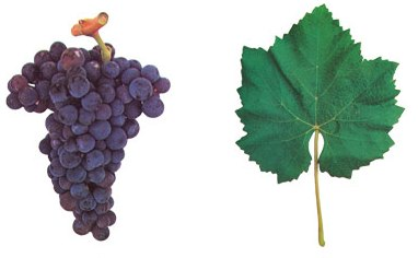 Blatt und Traube der Rotweinsorte 'Castelao'